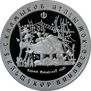 Памятная монета Республики Казахстан «Безымянное» С. Калмакова из серии «Художники-графики Казахстана» - 500 тенге - серебро - реверс